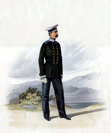 Рядовой Л.-Гв. Кирасирского Ея Величества полка, 22 февраля 1857. (В вседневной форме).